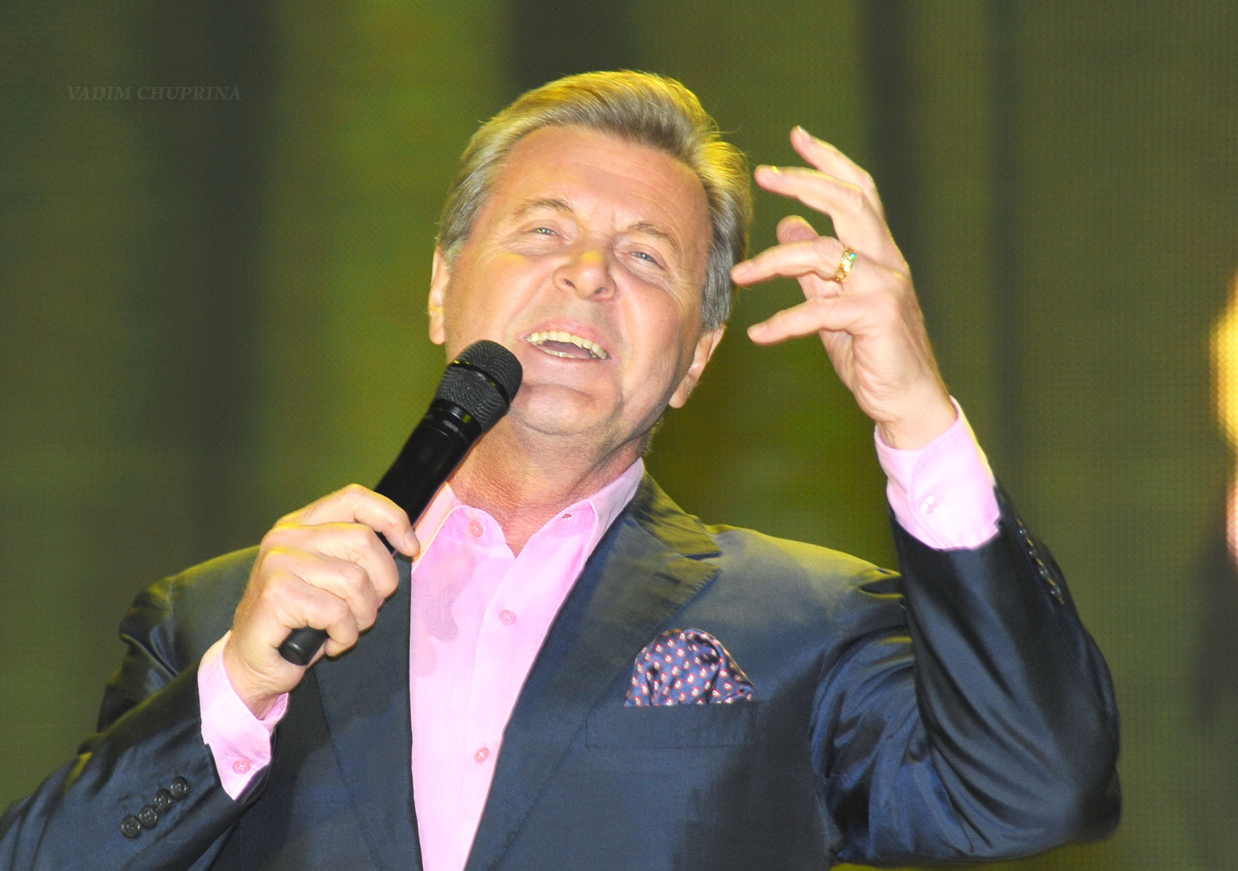 Лещенко, Лев Валерьянович фото Чуприна Вадим